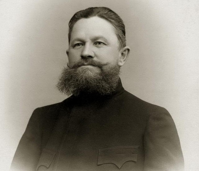 Георгий Ленов, внук Сергей Ленова, основателя шоколадно-кондитерской фабрики в Москве «Торговый дом Леновых»